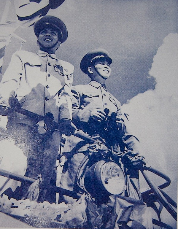 第一次インドシナ戦争終戦直後のベトナム人民軍高官ら。